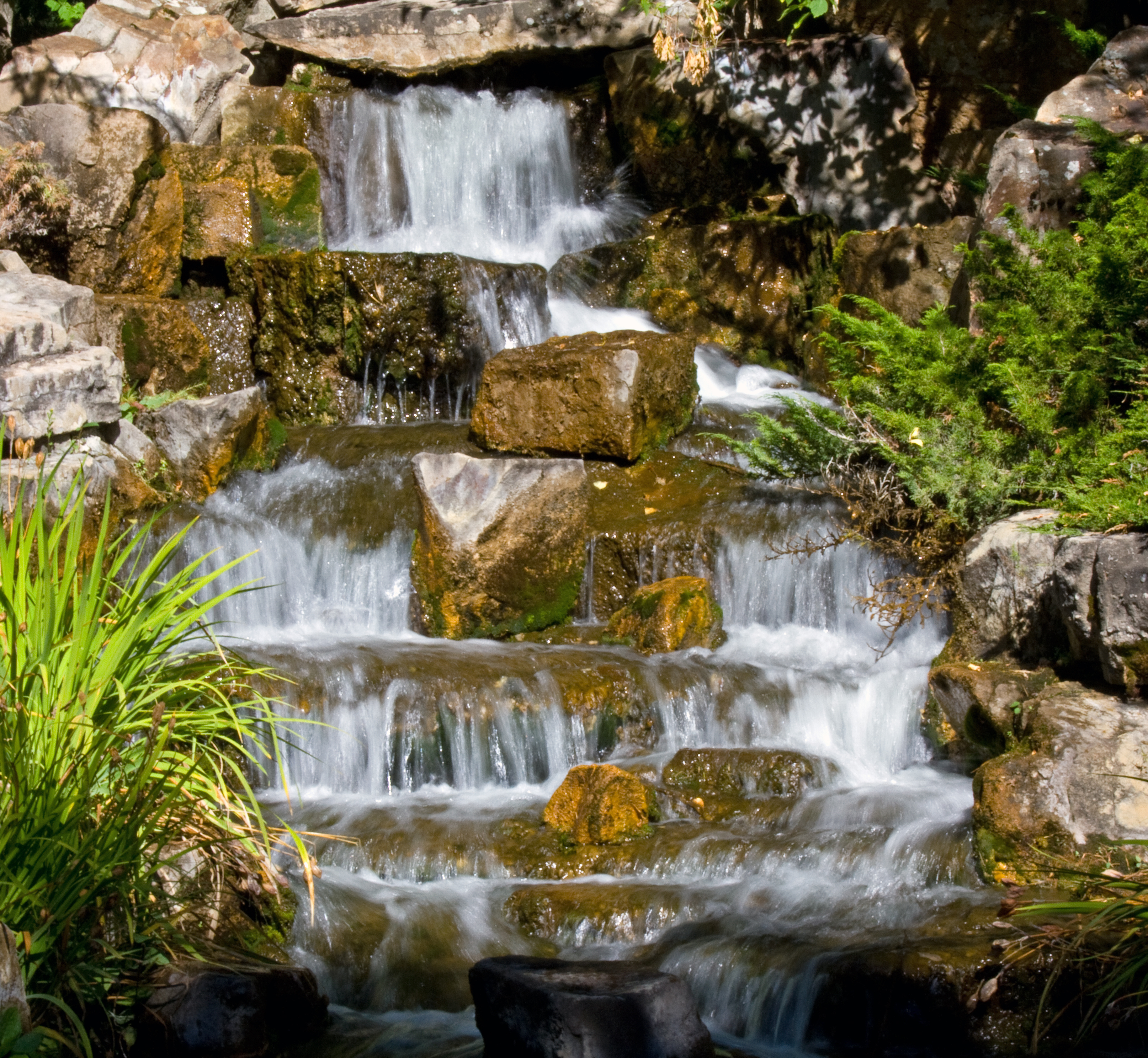 Small Waterfall